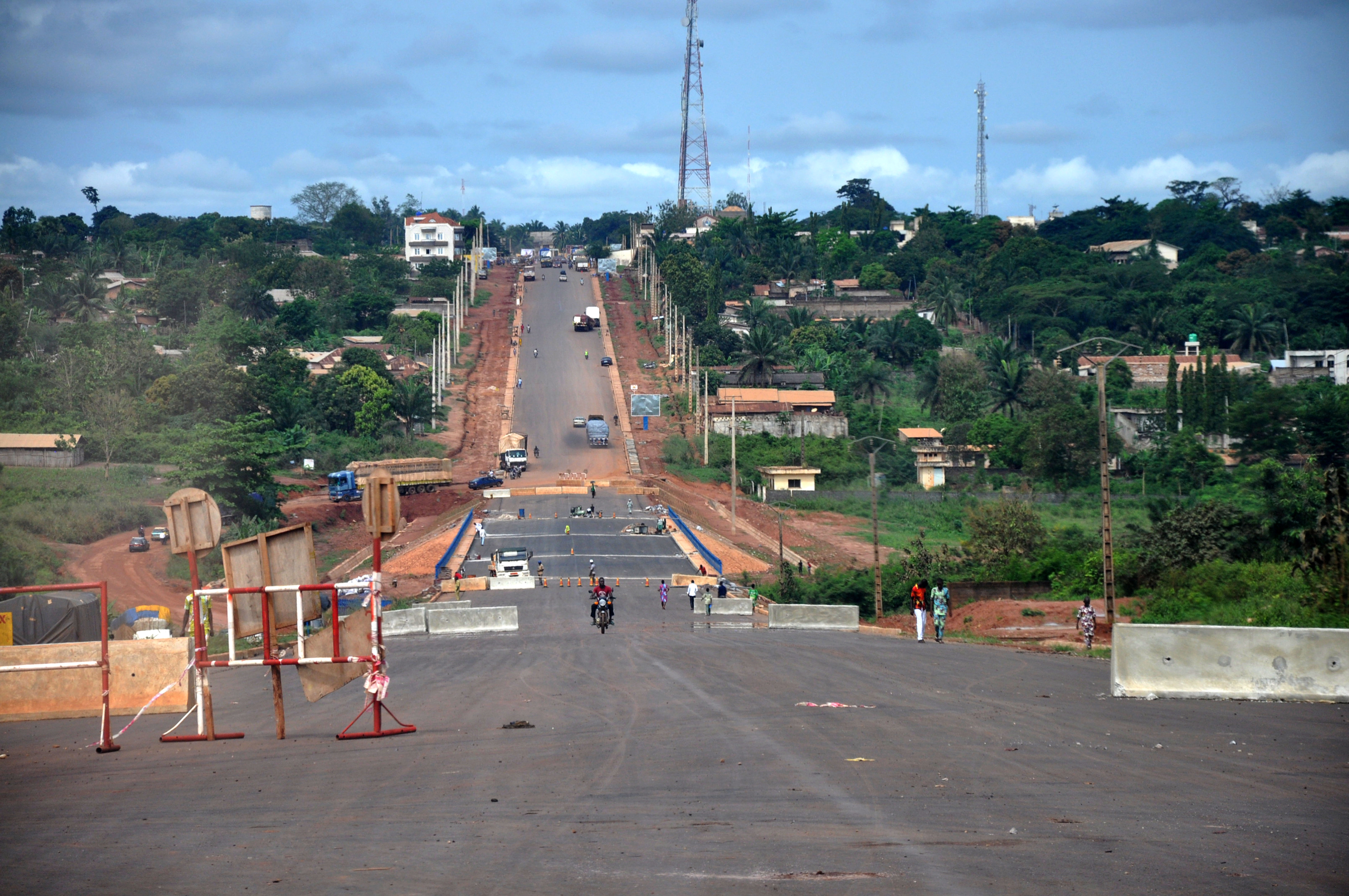 finally a brake for daily accidents on this allada road axis This is an image with the theme "Africa on the Move or Transport" from: Benin